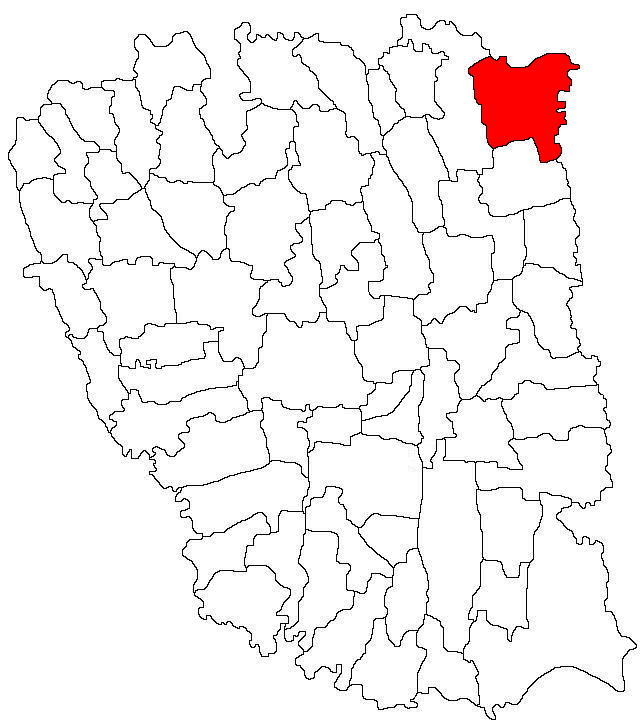 Categorie:Hărţi ale judeţului Galaţi